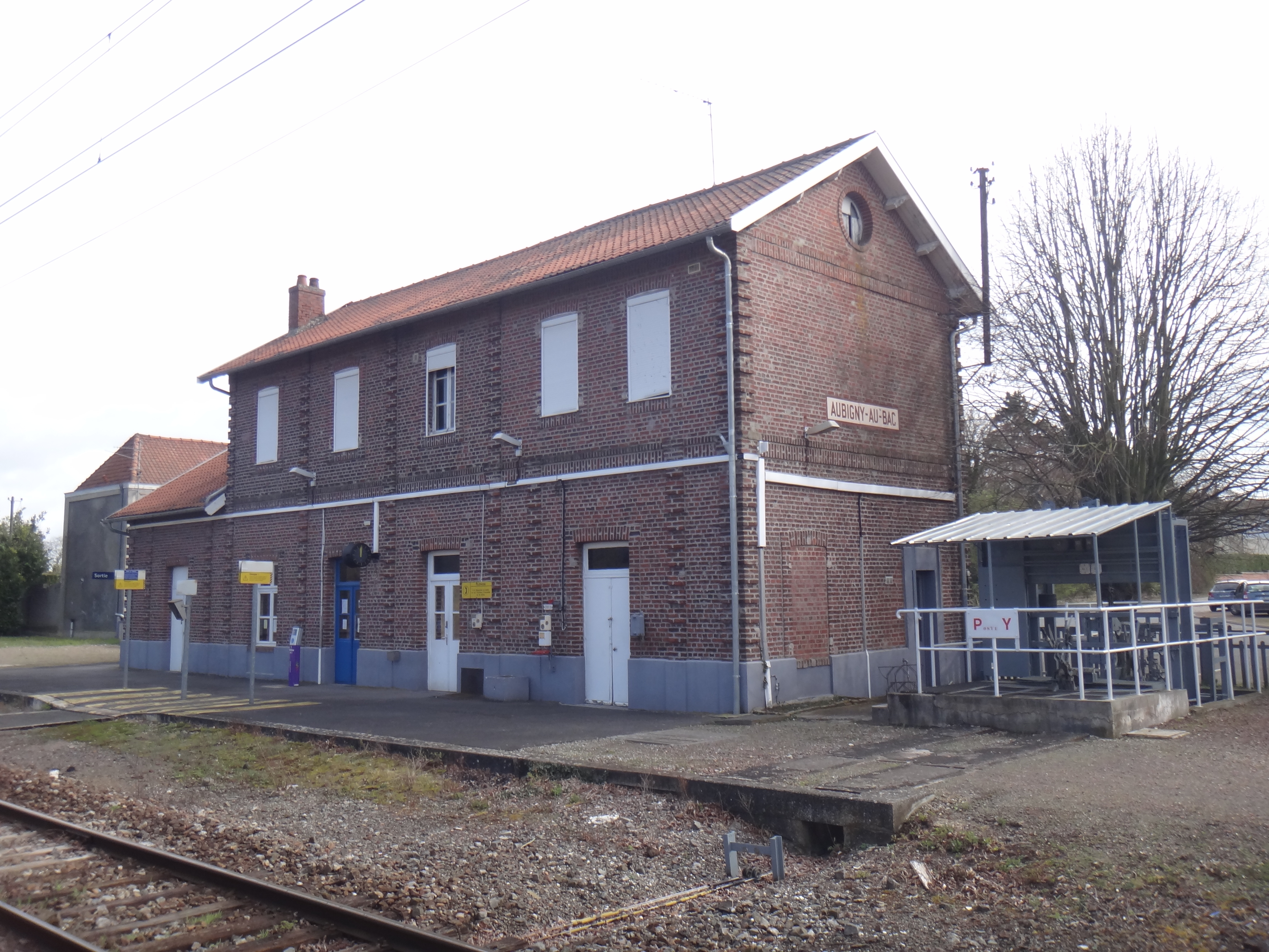 Gare d'Aubigny-au-Bac, Nord, France, en 2014